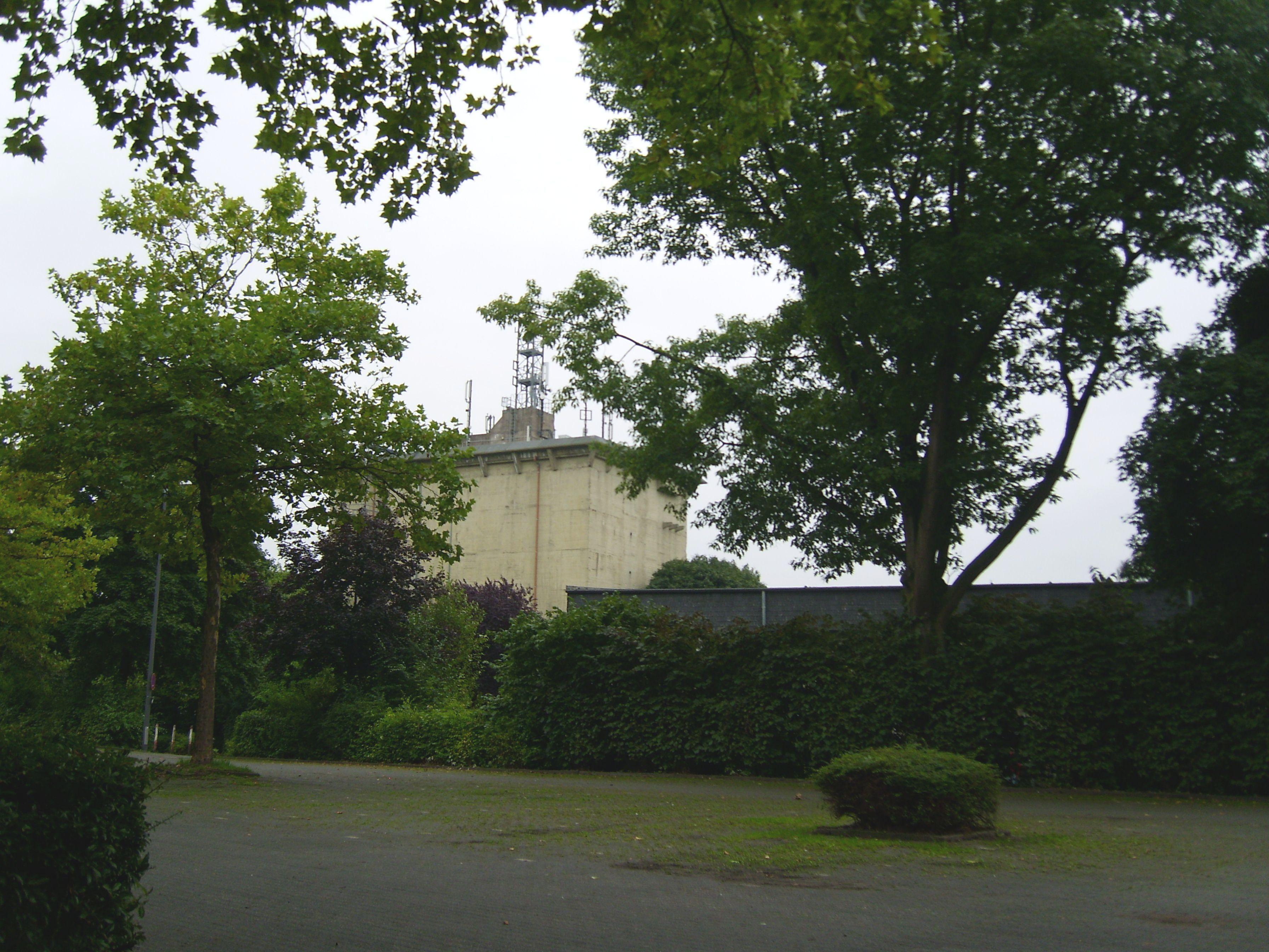 Der Bunker am Kuniberg im Recklinghäuser Ostviertel, von der Beuthener Straße (NW) aus